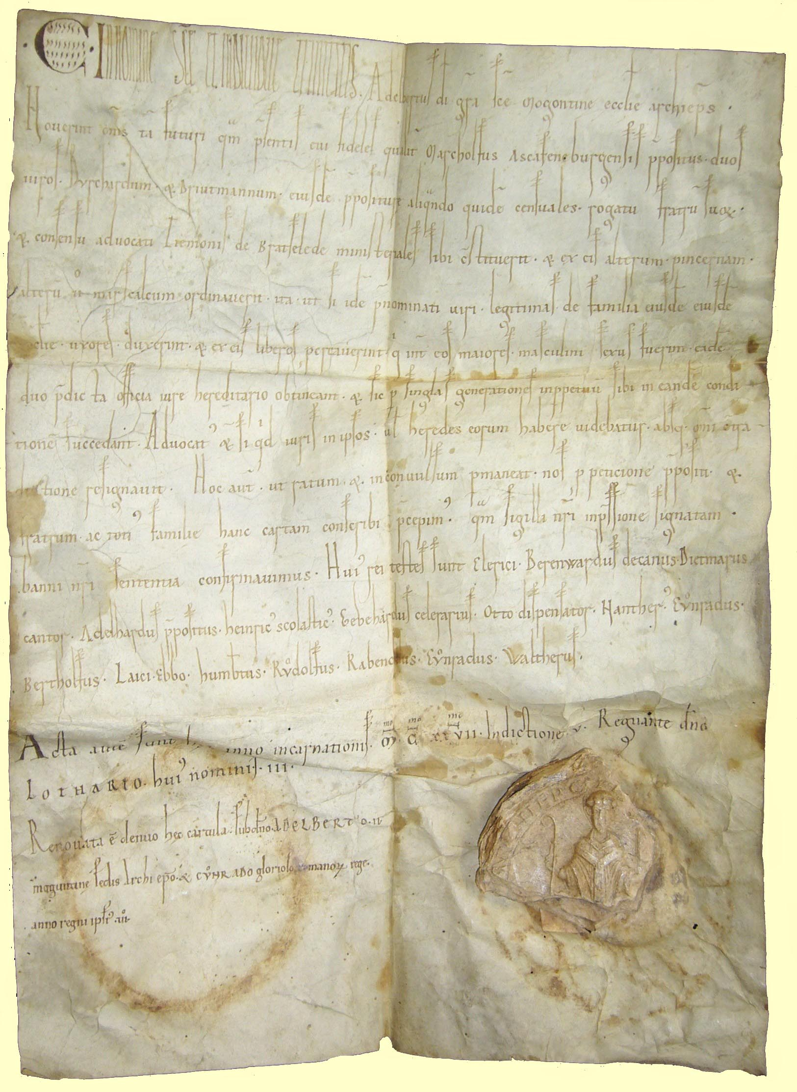 Stiftsarchiv, Urkunden, Nr. 2795: Urkunde im Stadt- und Stiftsarchiv Aschaffenburg; Aussteller: Der Mainzer Erzbischof Adalbert I. von Saarbrücken. Kopie von 1140/41 nach einer Urkunde von 1127. Quellen: Regesta archiepiscoporum Maguntinensium: Nr. 188 und Gudenus, S. 394